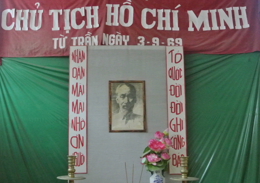 ベトナム、ドンタップ省カオラン市の省博物館（入場無料）のホー・チ・ミン祭壇